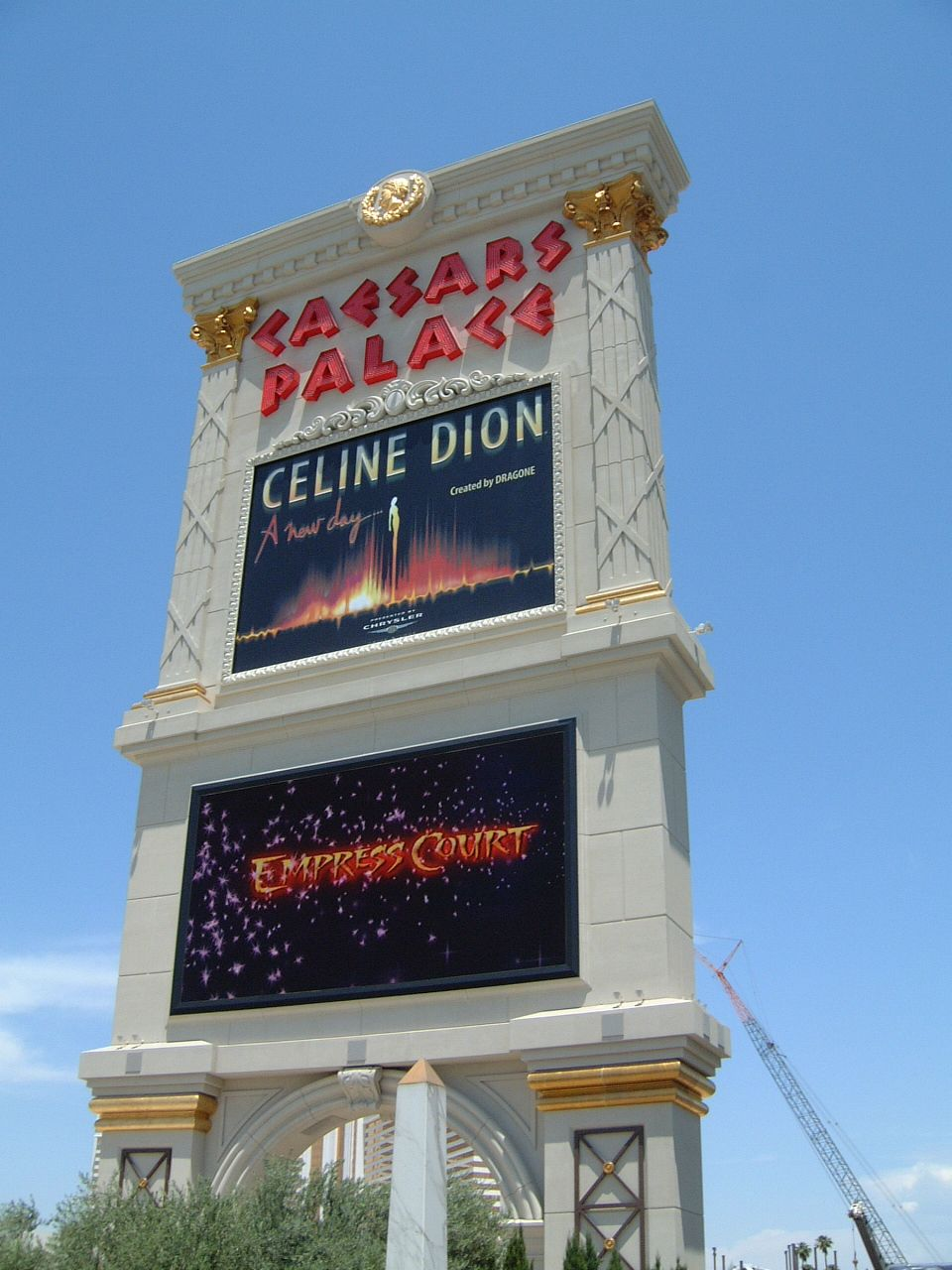 Caesars Palace Celine Dion Sign